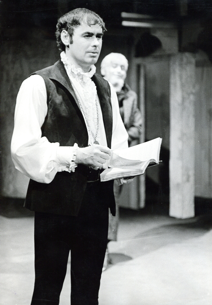 William Shakespeare, Hamlet, Drama SNG v Ljubljani. Na fotografiji: Danilo Benedičič (Hamlet), Polde Bibič (Polonij).